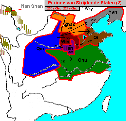 Tweede periode Strijdende Staten